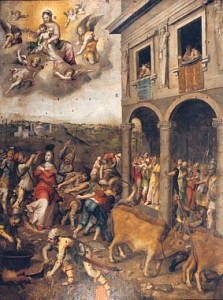 Martyre de sainte Lucie